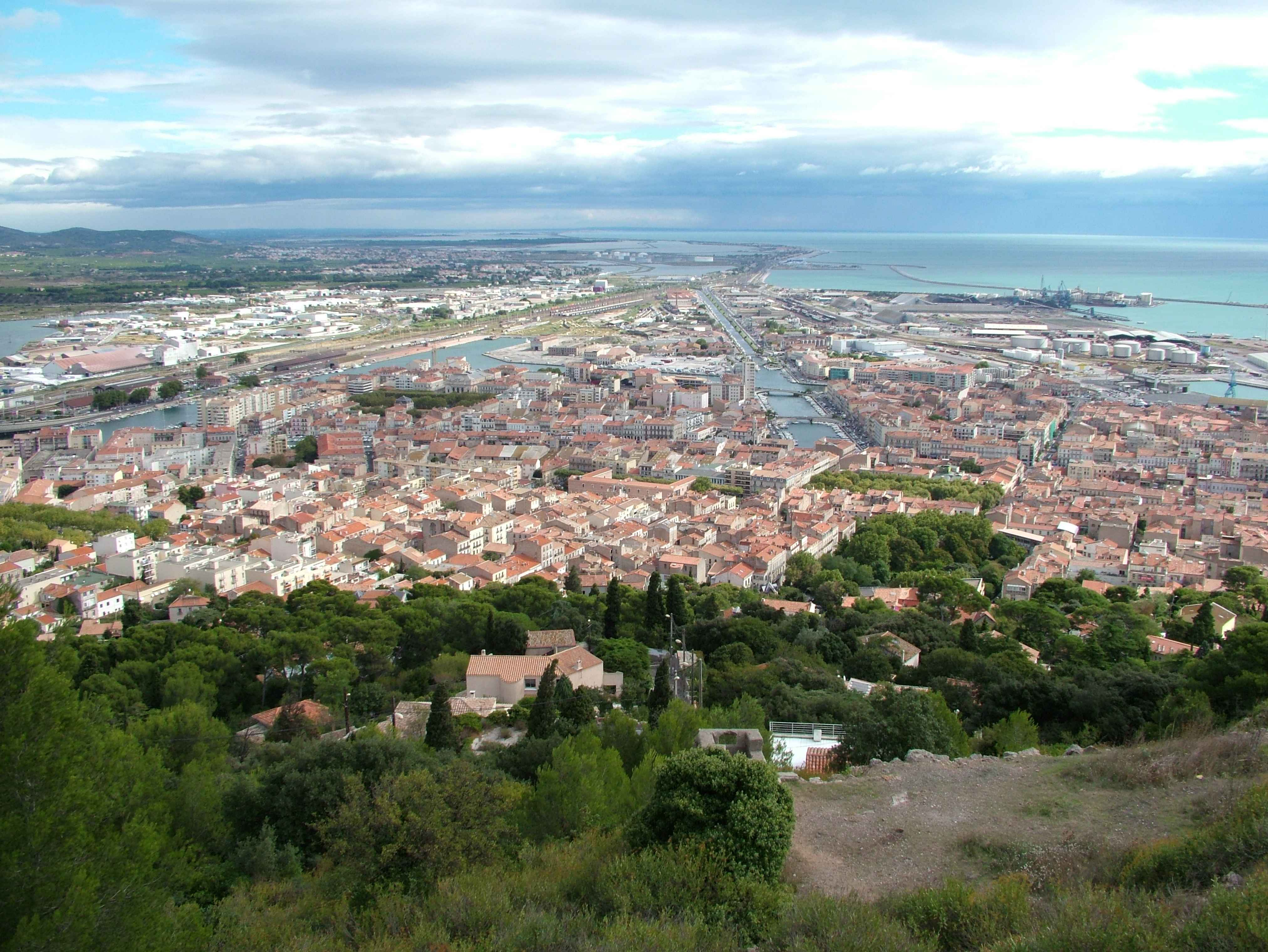 Sète (Hérault) - Die Stadt vom Berg Mont St-Clair aus. Das Bild zeigt die Stadt in Richtung Oste